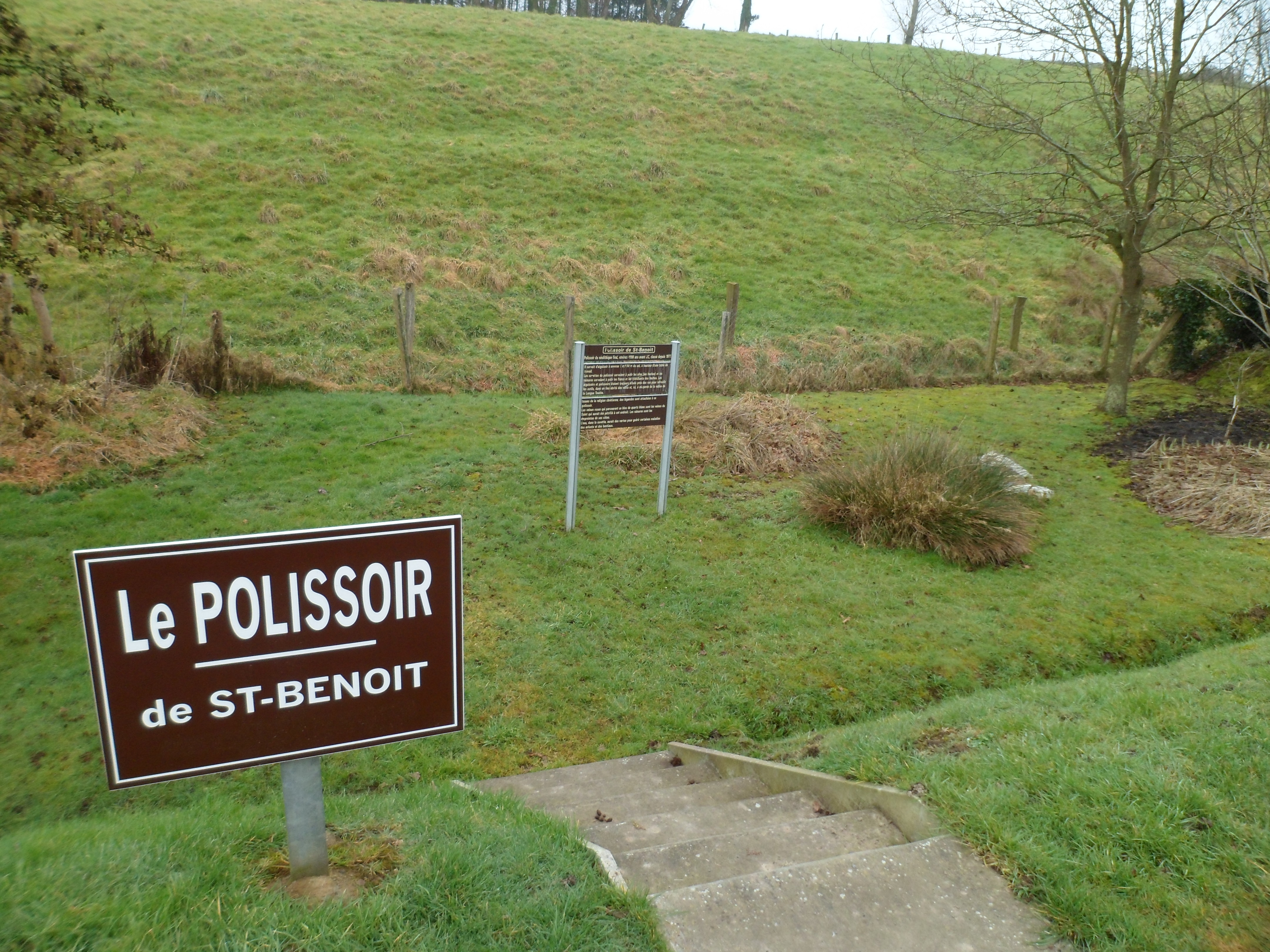 Polissoir de Saint-Benoît, Saint-James